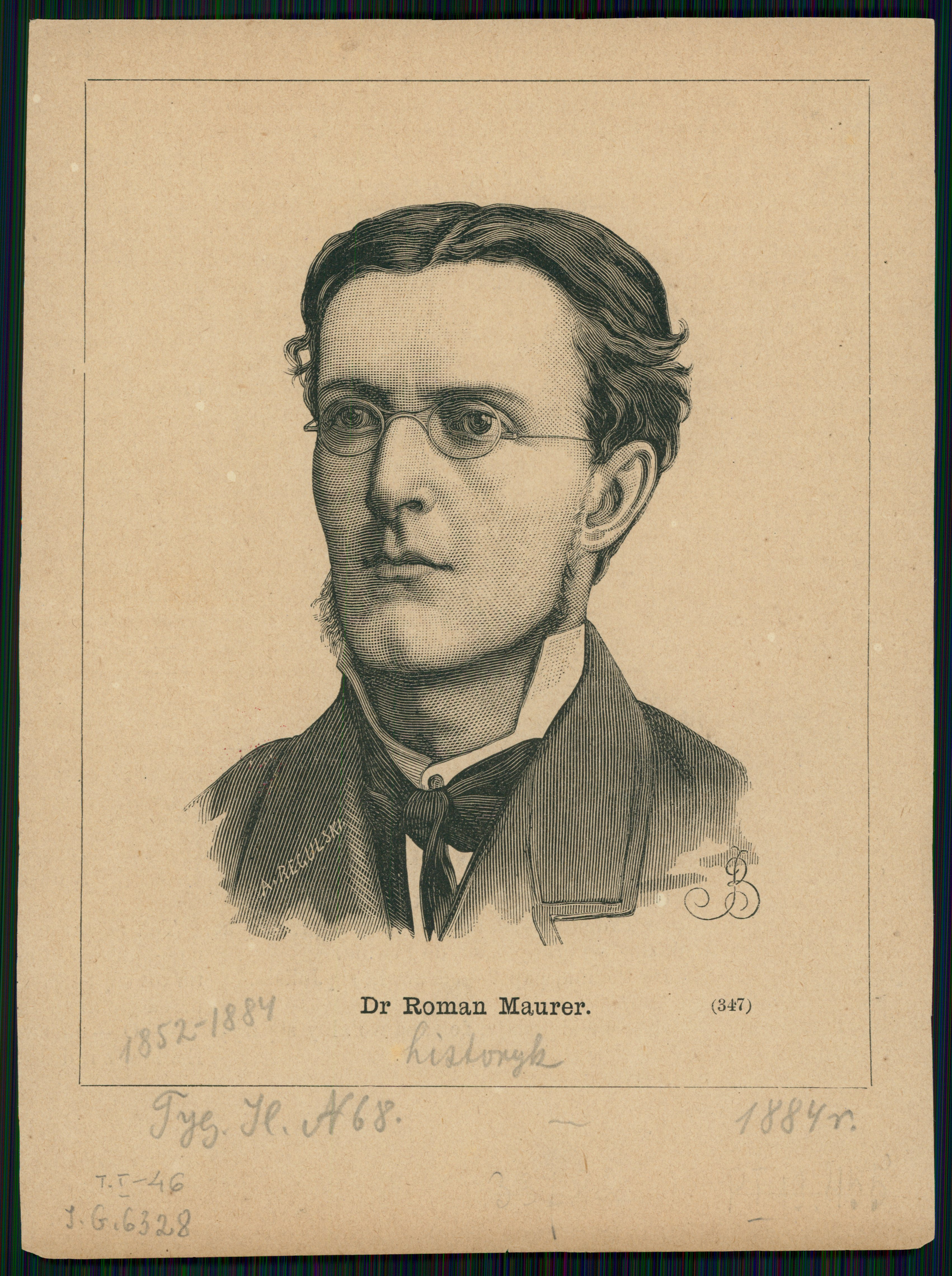 Roman Maurer, 1884 r.